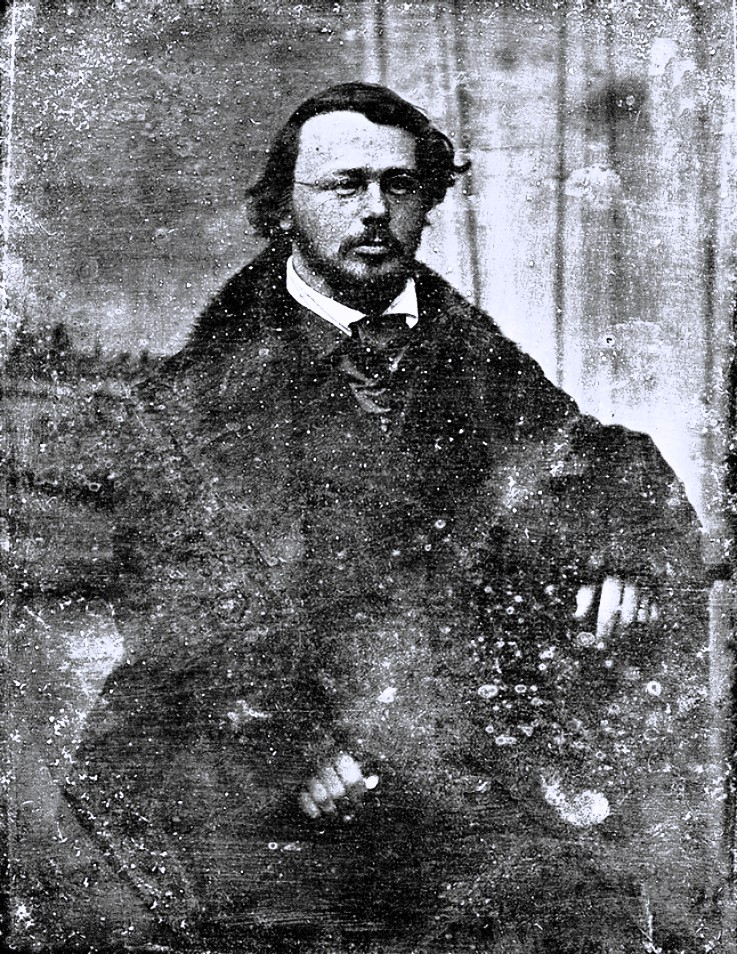 Fotograf: Carl Gustav Oehme (1817 - 1881). Porträt von Anton Ferdinand Benda (1817 - 1893). 1856. Daguerreotypie-Halbplatte, in Originalpapierumrandung, mit Papierklebeband wieder verschlossen, mit Bleistift kommentiert: Anton Ferdinand Benda 1856, Lübeck